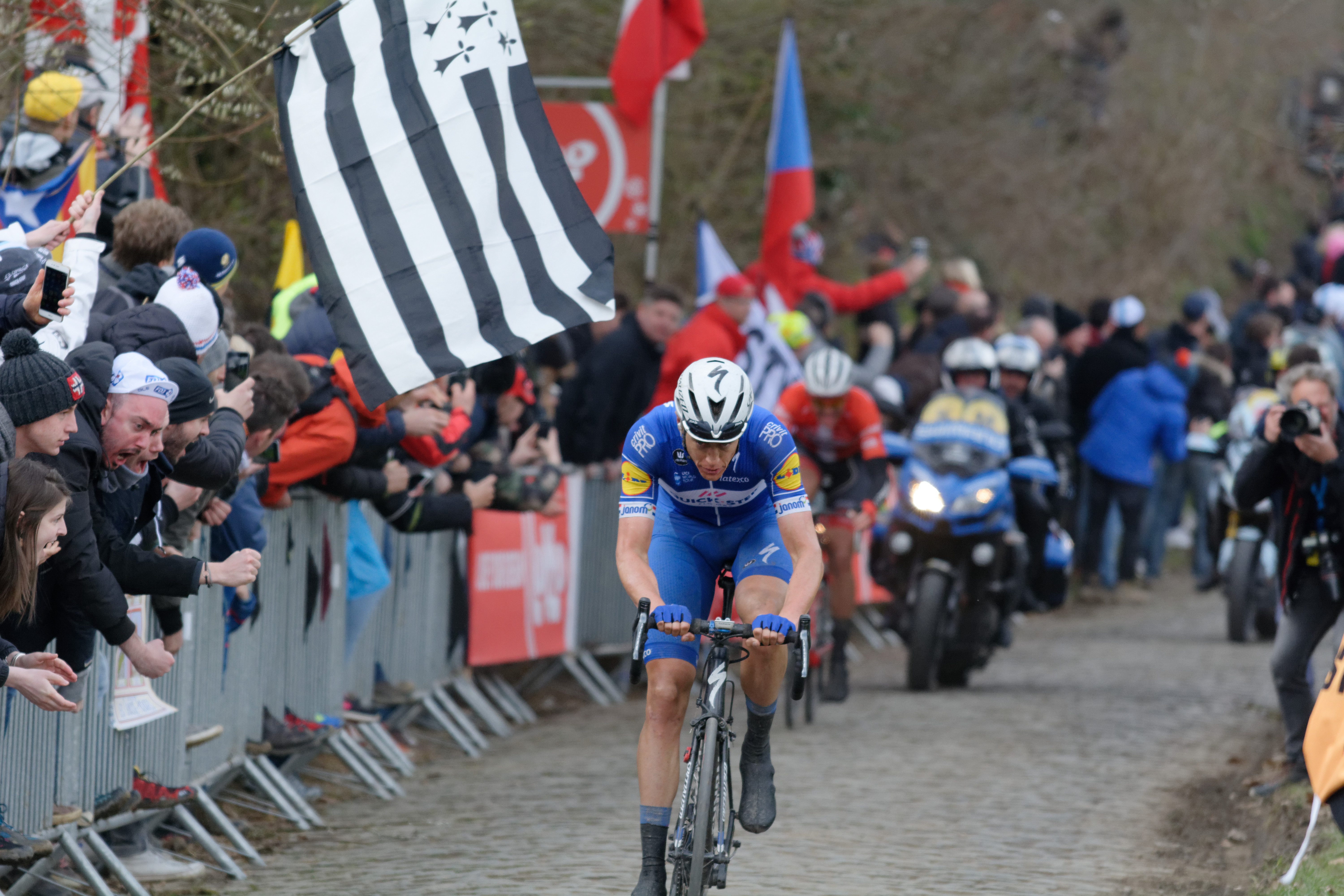 Ronde Van Vlaanderen 2018 / Tour of Flanders 2018 Oude Kwaremont